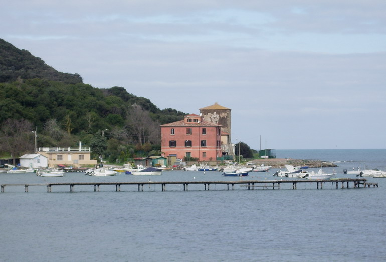 Il Porto di Baratti con la torre di avvistamento sullo sfondo nel comune di Piombino